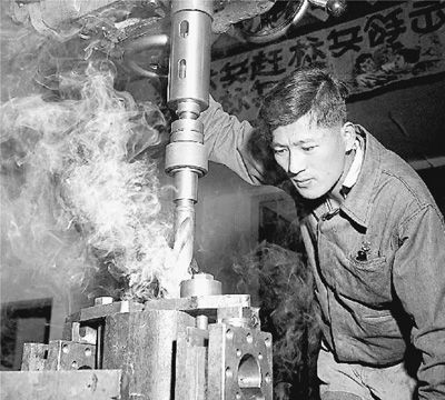 一九五九年十月，共产党员、青年钳工倪志福在工作中。他创造的一种优质、高速、长寿的新型钻头在全国许多地方推广。